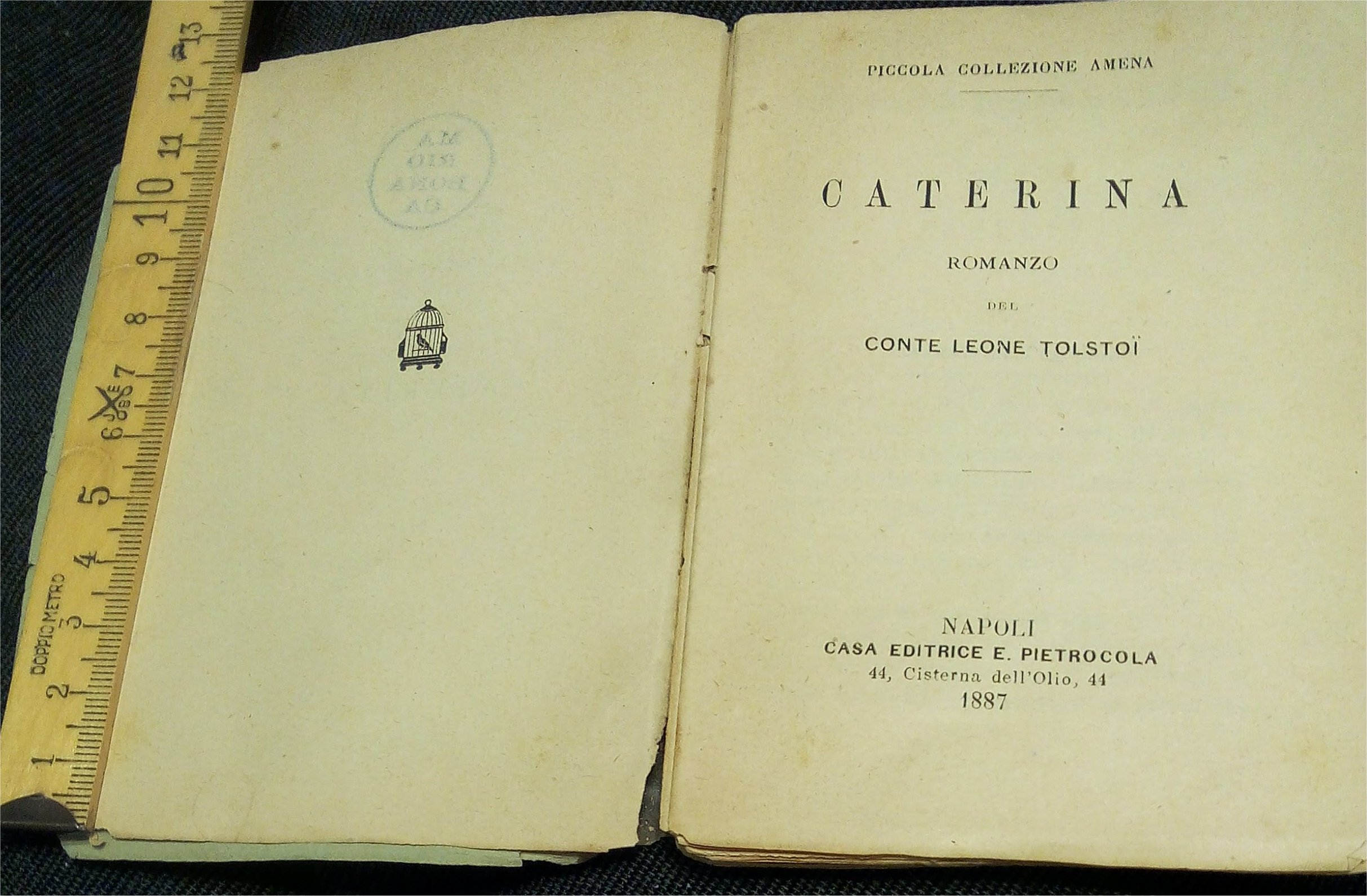 prime pagine del n.10 di Piccola Collezione Amena 1887 Caterina di Tolstoi